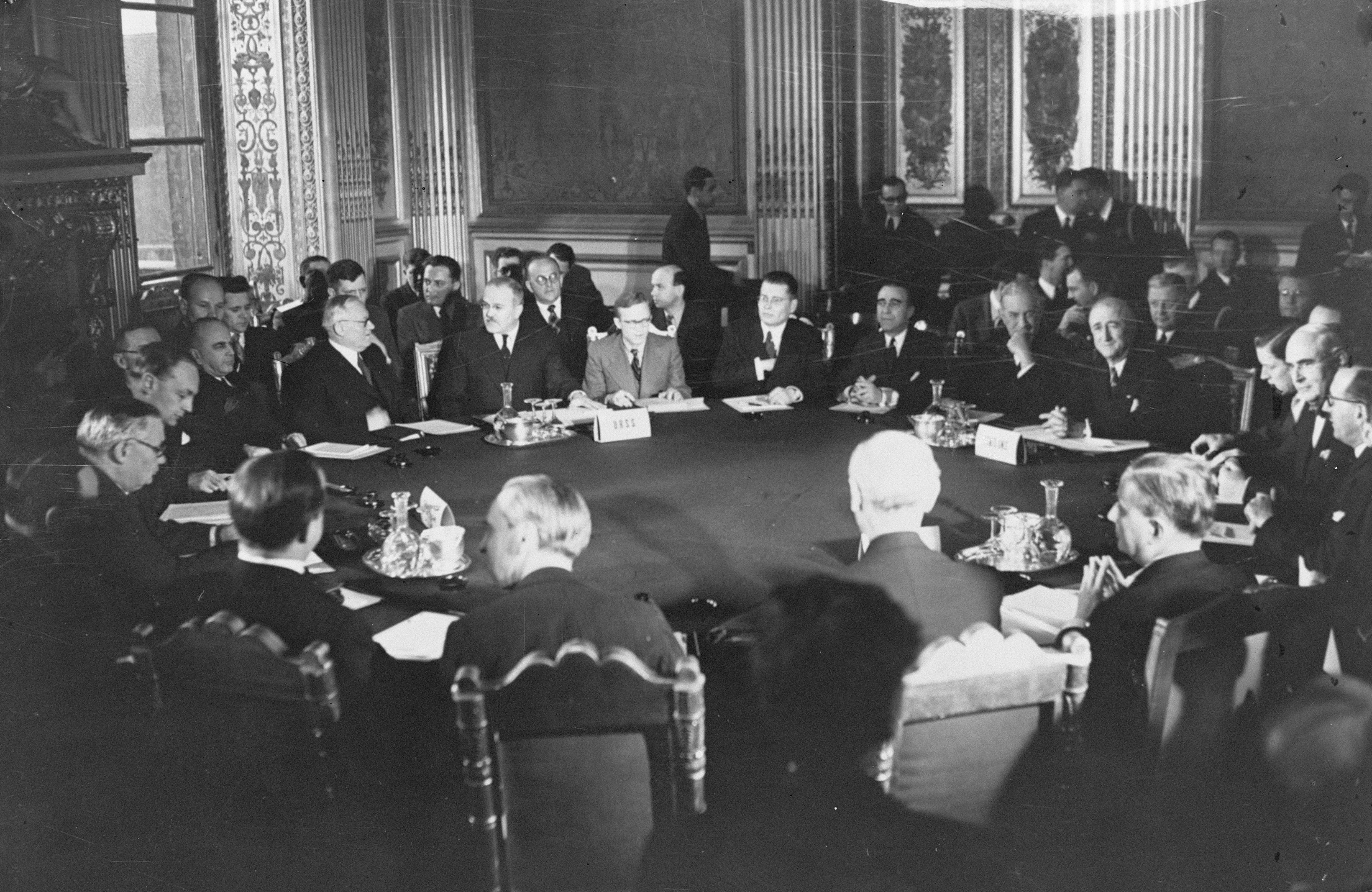 Collectie / Archief : Fotocollectie Anefo Reportage / Serie : [ onbekend ] Beschrijving : De conferentie van de "vier" in Parijs Datum : 27 april 1946 Locatie : Frankrijk, Parijs Trefwoorden : conferenties Fotograaf : Agence France Presse (AFP) Auteursrechthebbende : Nationaal Archief Materiaalsoort : Glasnegatief Nummer archiefinventaris : bekijk toegang 2.24.01.09 Bestanddeelnummer : 901-6939